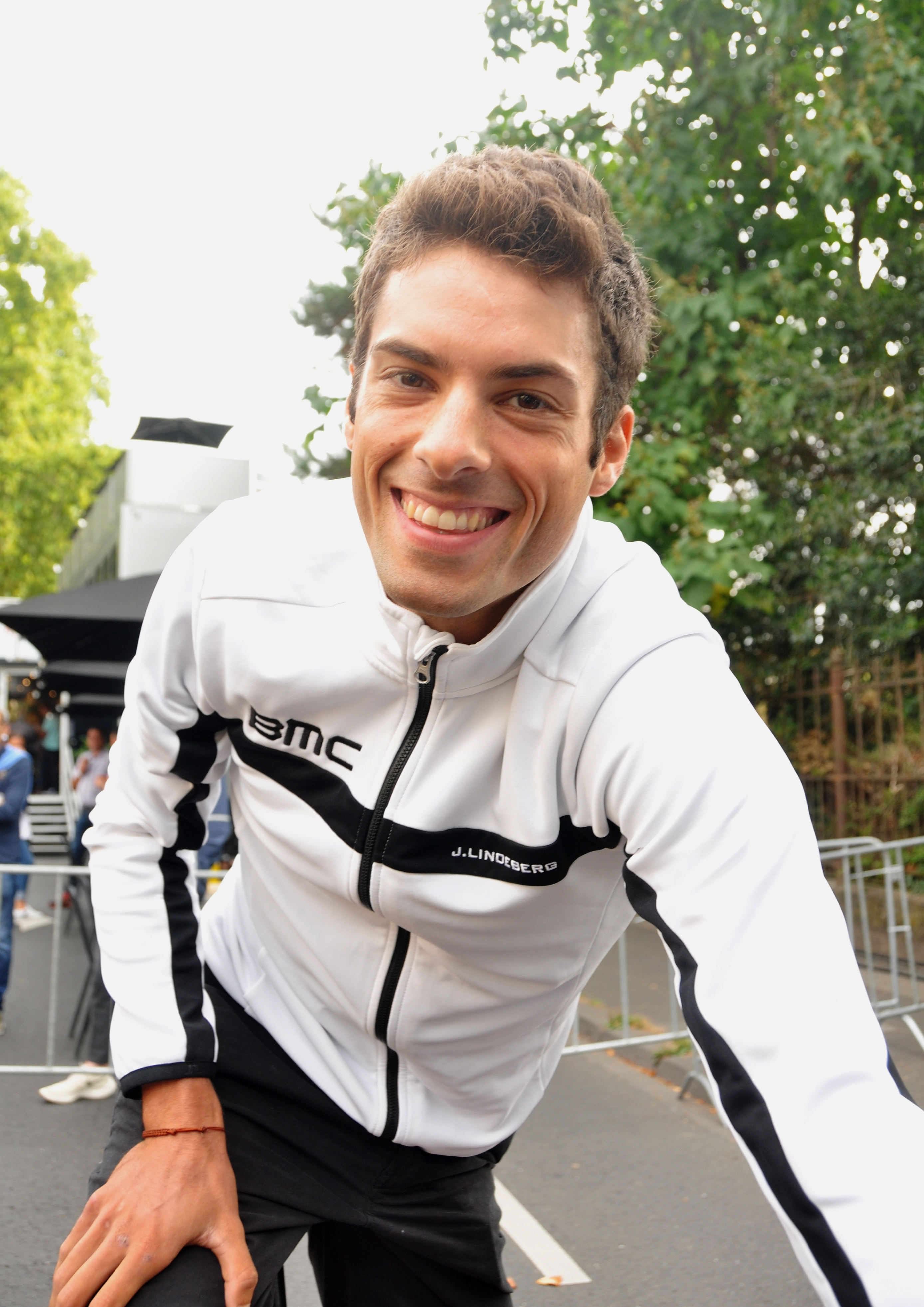 Freddy Ovett, australischer Radrennfahrer